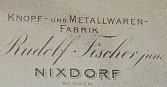 Logo továrny Rudolf Fischer jun. na hlavičkovém papíře